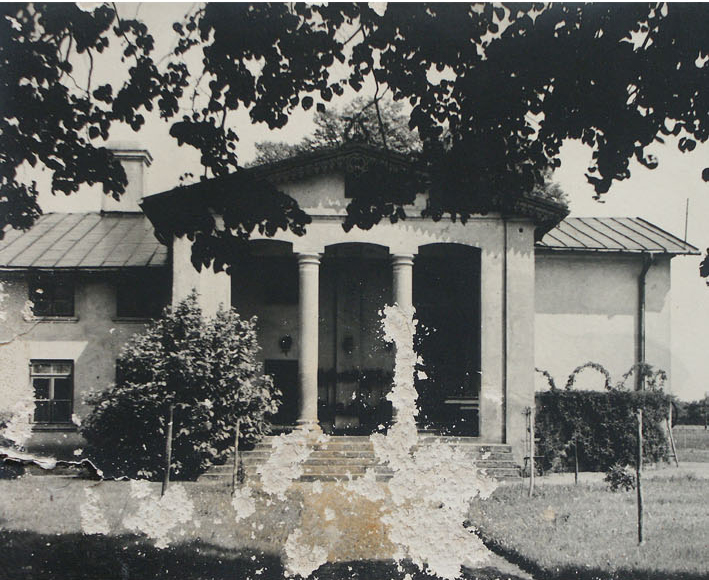 House of Polish landlord, Felicjan Otocki a member of the Second Russian State Duma, 1907 in Dobiecinie